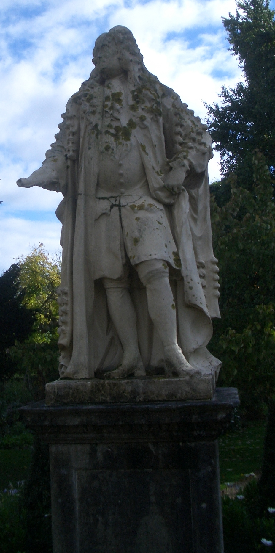 Statue von Hans Sloane, Chelsea Physics Garden, Kopie